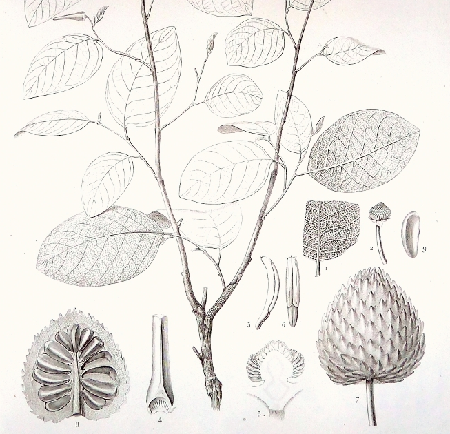 Annona bullata, con sus principales partes. 1.- Fragmento de hoja vista por debajo. 2.- Gynandrófora cubierta por los estambres y pistilos, y rodeada por el cáliz. 3.- La misma cortada longitudinalmente y aumentada. 4.- Porción de un pétalo visto por su cara interna. 5.- Estambre aumentado y visto de lado. 6.- El mismo, visto de frente. 7.- Fruto de tamaño natural. 8.- El mismo, cortado longitudinalmente. 9.- Una semilla separada.